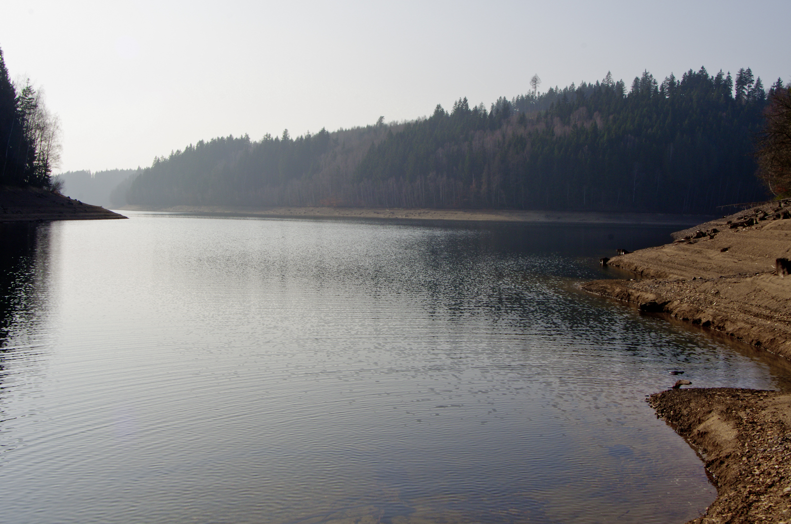 vodní nádrž Horka na Libockém potoku, okres Sokolov